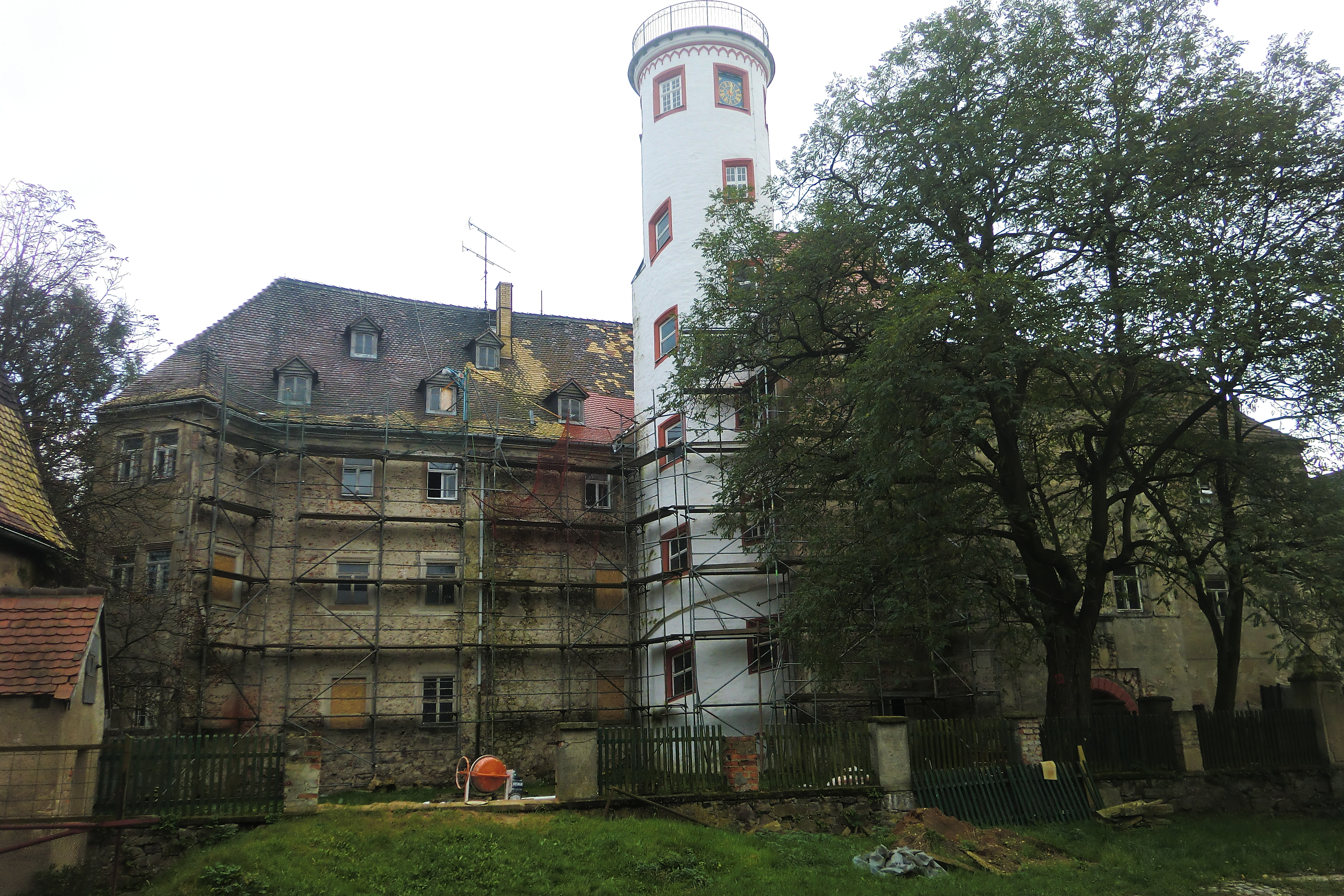 Schloss Noschkowitz ist ein Renaissance-Schloss aus dem 16. Jahrhundert, Zustand Oktober 2014